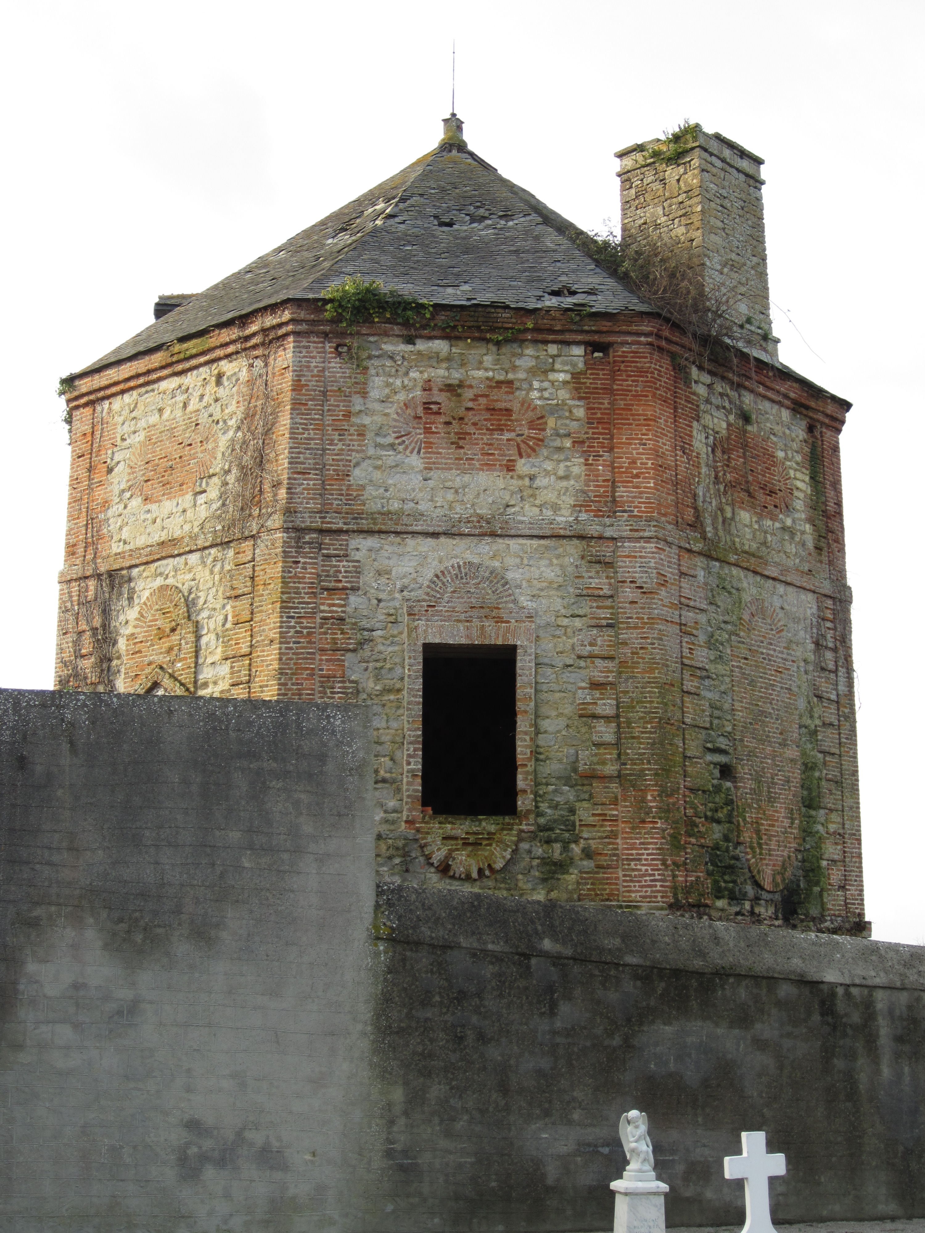 Ravenoville